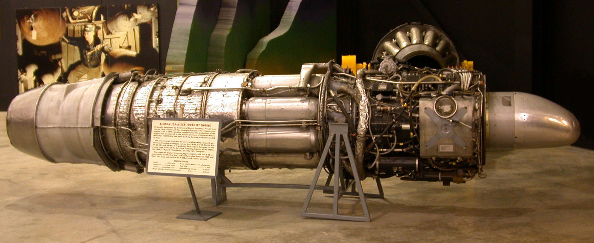 Allison J35-A-35A turbojet, USAF Museum, Ohio / 2004